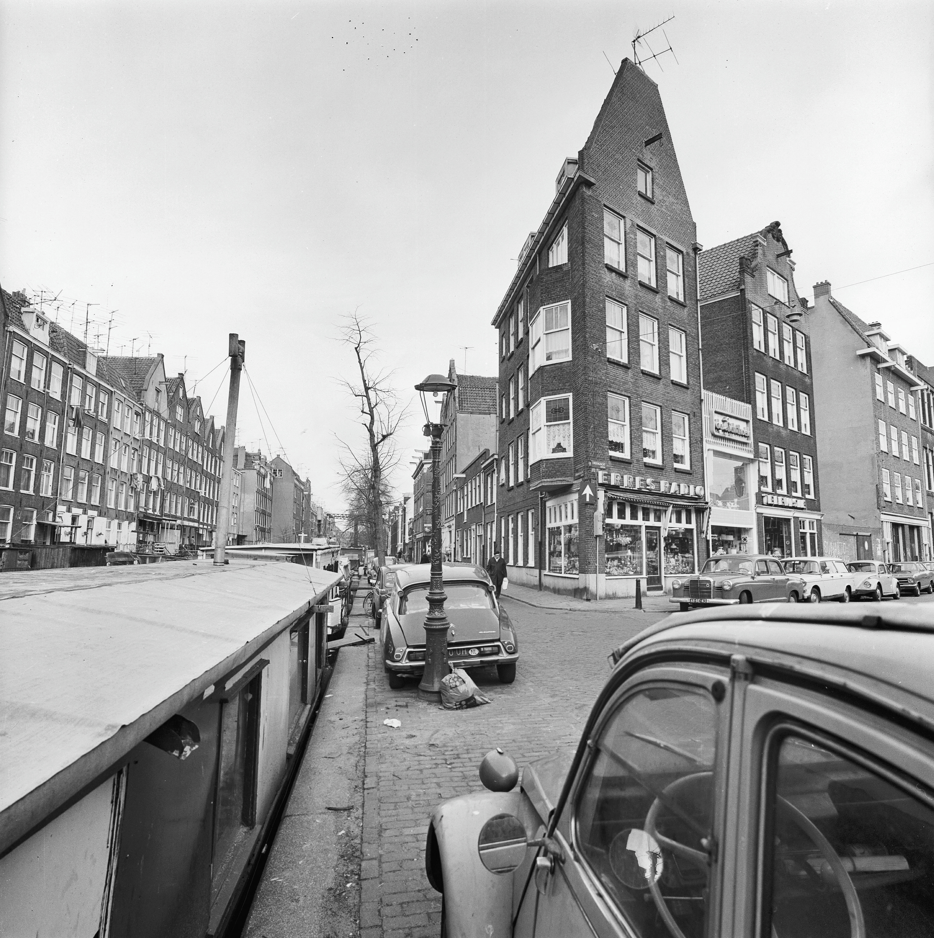 hoek Lindengracht, overzicht